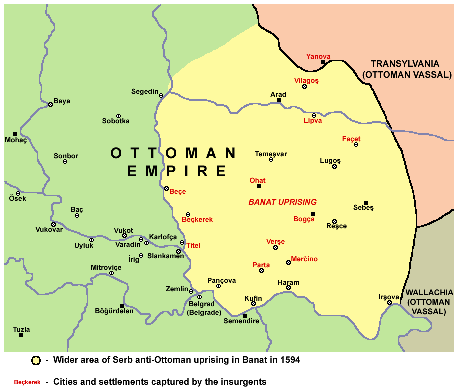 Map of Serb anti-Ottoman uprising in Banat in 1594.Mapa srpskog ustanka protiv osmanske vlasti u Banatu, 1594. godine.